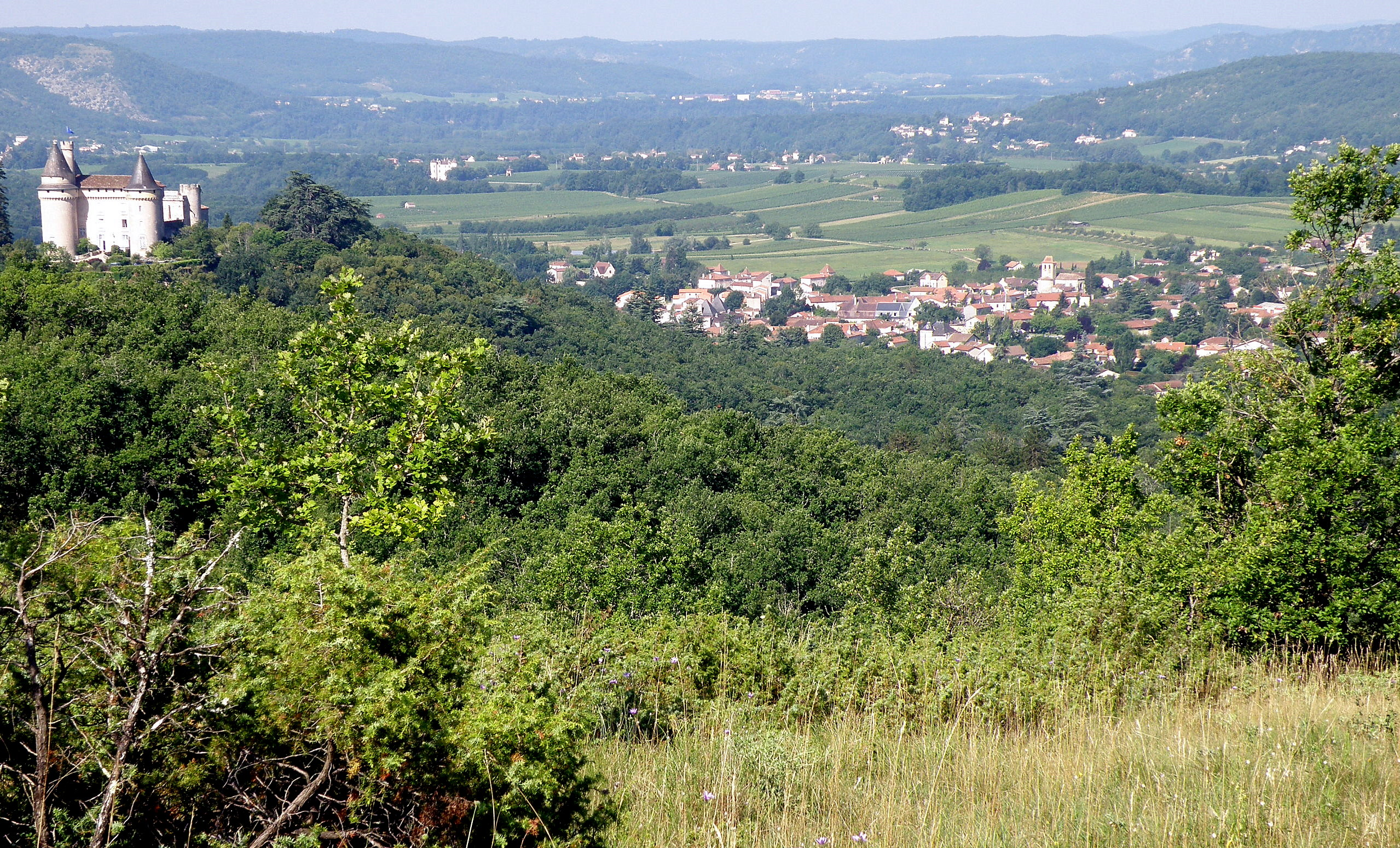 Vue générale de Mercuès, commune et village du dép. du Lot (région Midi-Pyrénées, France), situés sur le Lot à huit km env. au nord-ouest (et en aval) de Cahors. Photographie prise depuis les hauteurs sises à l'est-nord-est du village. On aperçoit : à gauche, le château de Mercuès (façade est) ; à droite, le village de Mercuès, dont émerge le clocher de son église ; plus éloigné, dans la plaine à gauche, parmi les vignes (vin de Cahors), le château de Lagrézette (comm. de Caillac). Coup d’œil vers l’ouest-sud-ouest.